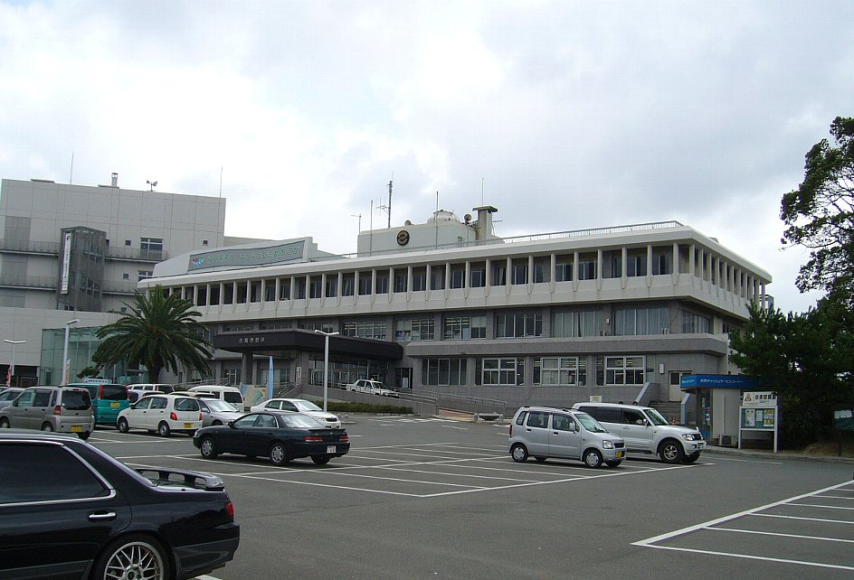 古賀市役所 2006年10月6日 Bakkai撮影 Category:福岡県の官公庁画像